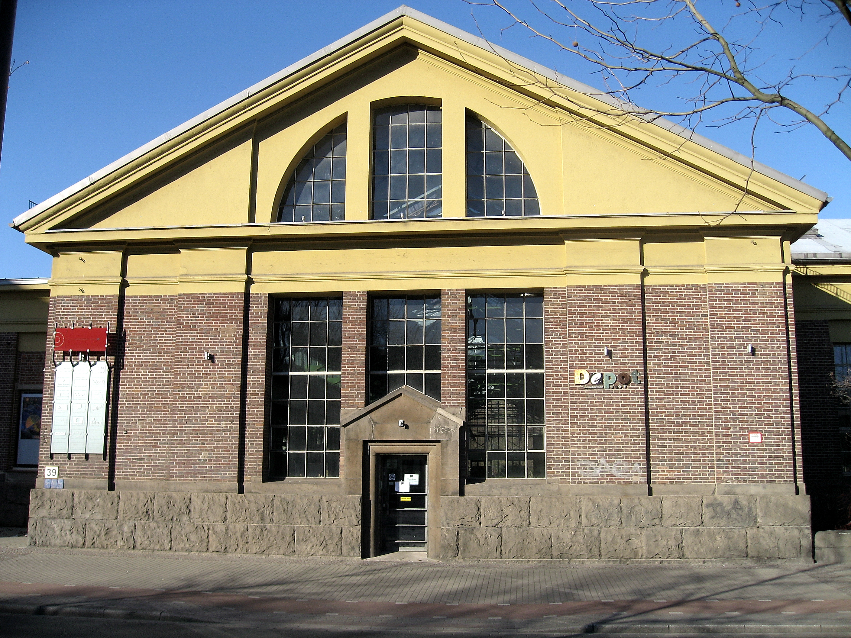 Dortmund, Nordstadt, Depot